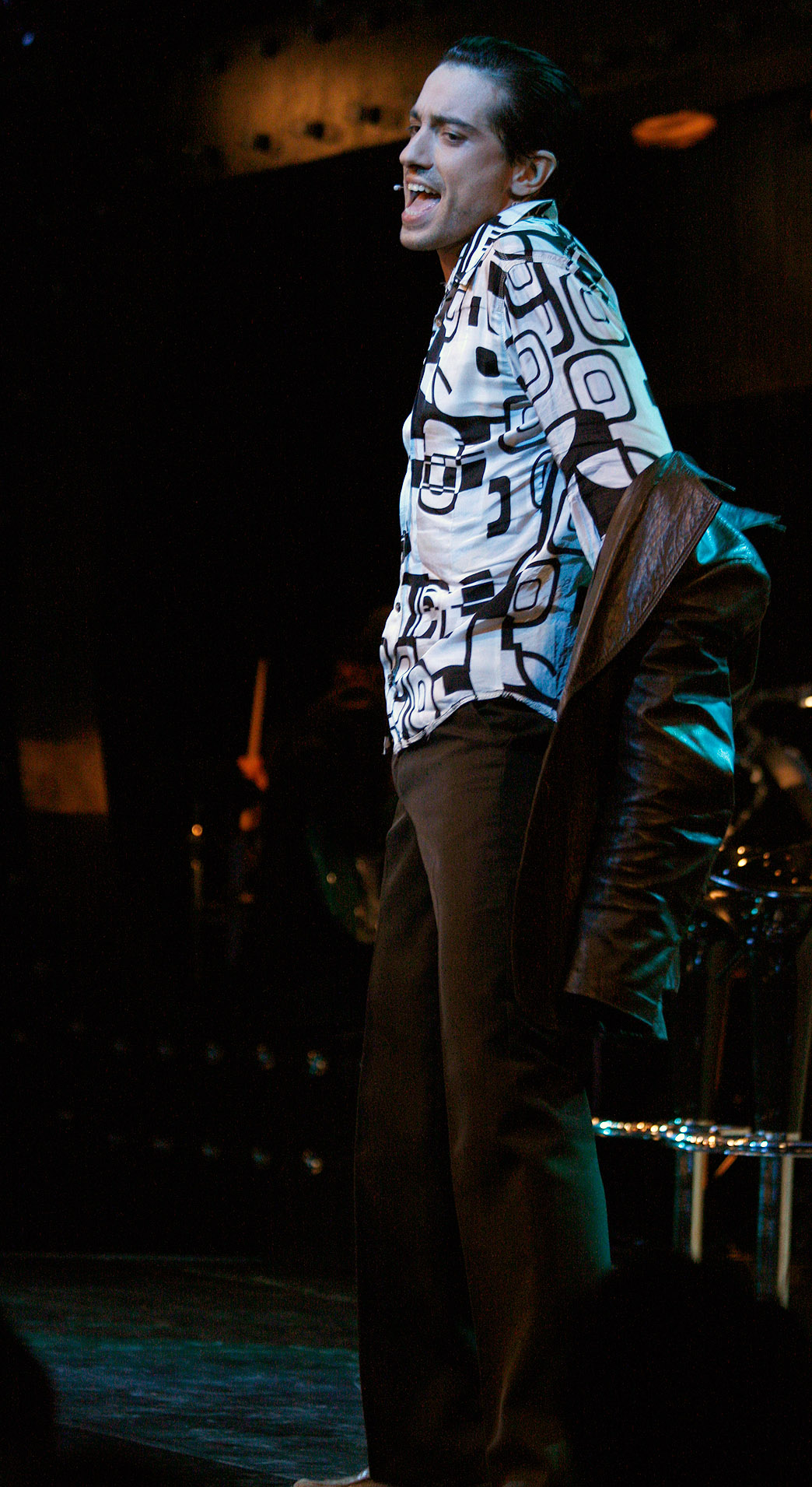 Stefano Bernardin während der Premiere der zweiten Saison des Musicals Ti Amo im Metropol in Wien.